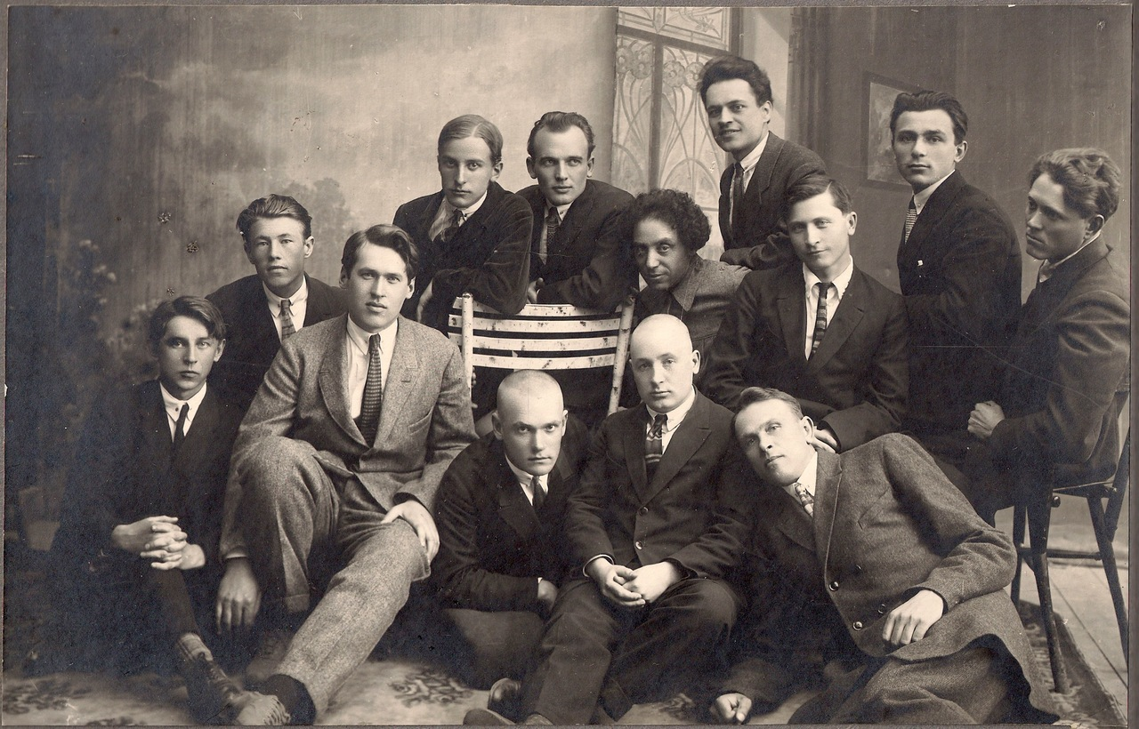 Беларуская (тарашкевіца): Літаратурнае згуртаваньне "Ўзвышша" 1 шэраг (зьлева направа ): В. Шашалевіч, П.Глебка, У.Дубоўка, М.Лужанін, К.Чорны, К.Крапіва; 2 шэраг: А.Адамовіч, У.Жылка, З.Бядуля, А.Бабарэка, Я.Пушча, С.Дарожны, Т.Кляшторны. 1929 г.